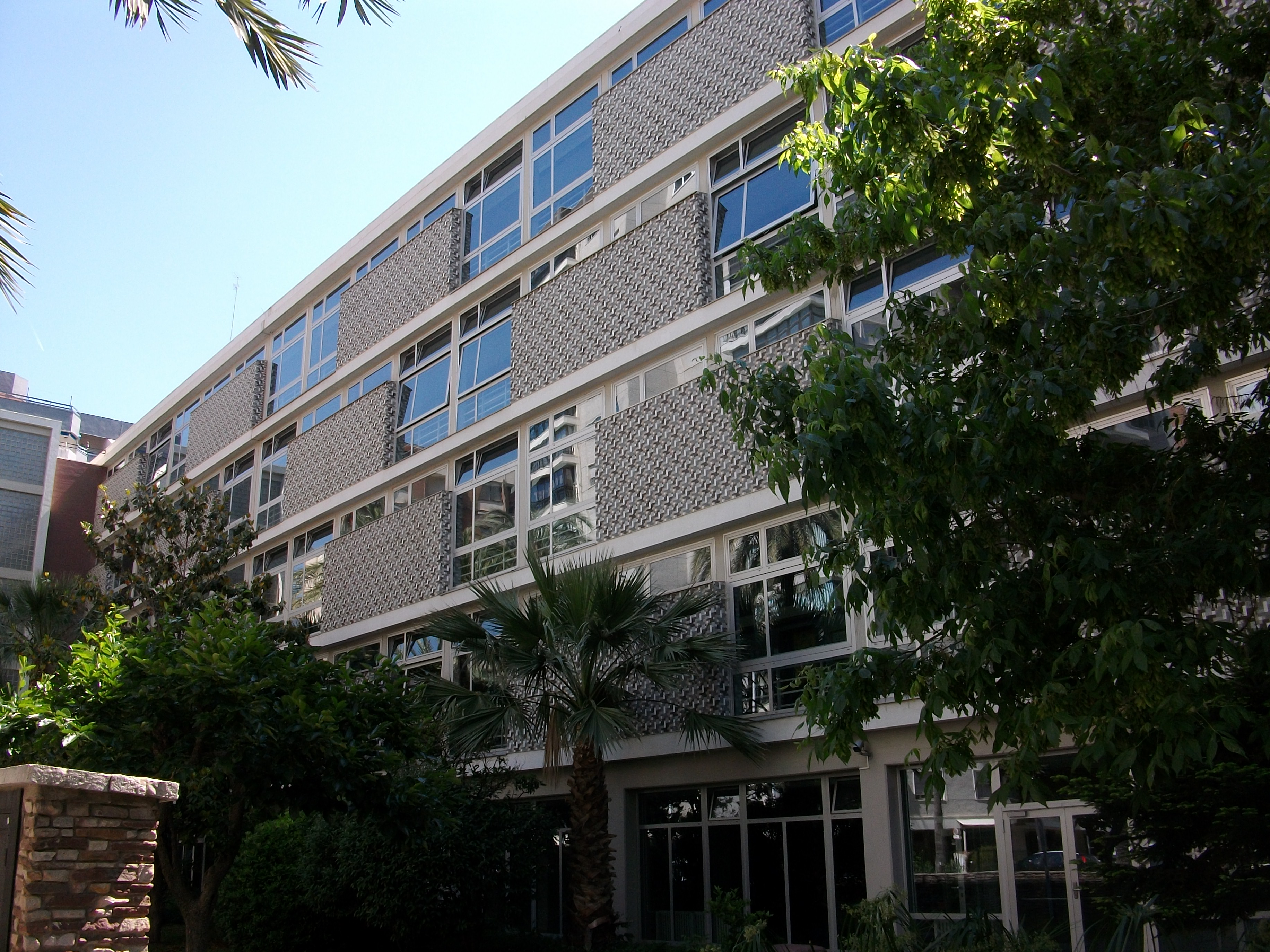 Edifici del Col·legi alemany de València.